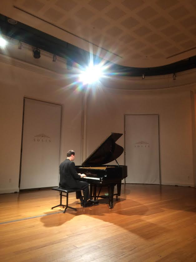 Teatro Solis